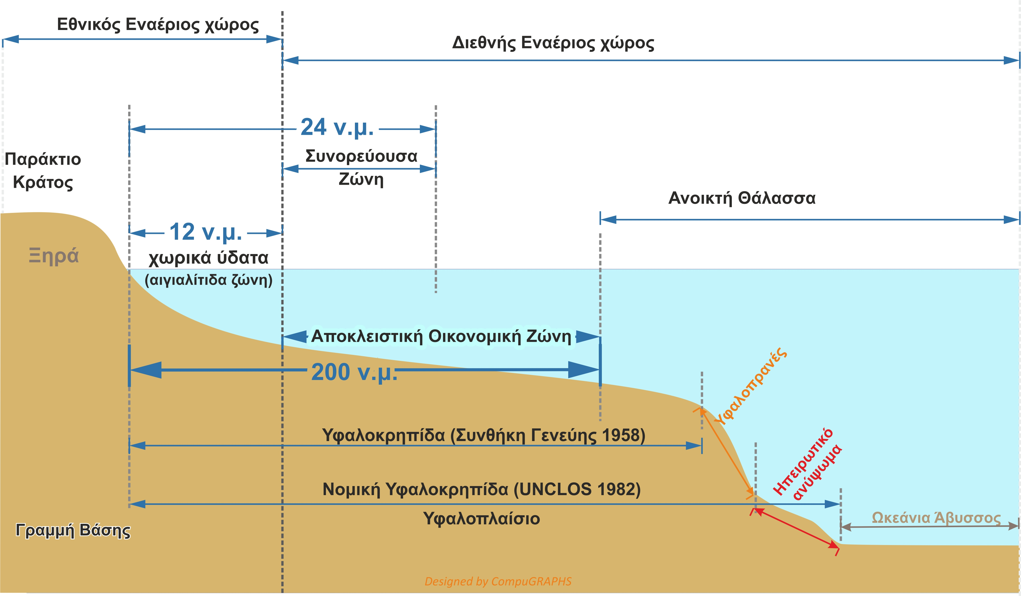 sea zones described graphically